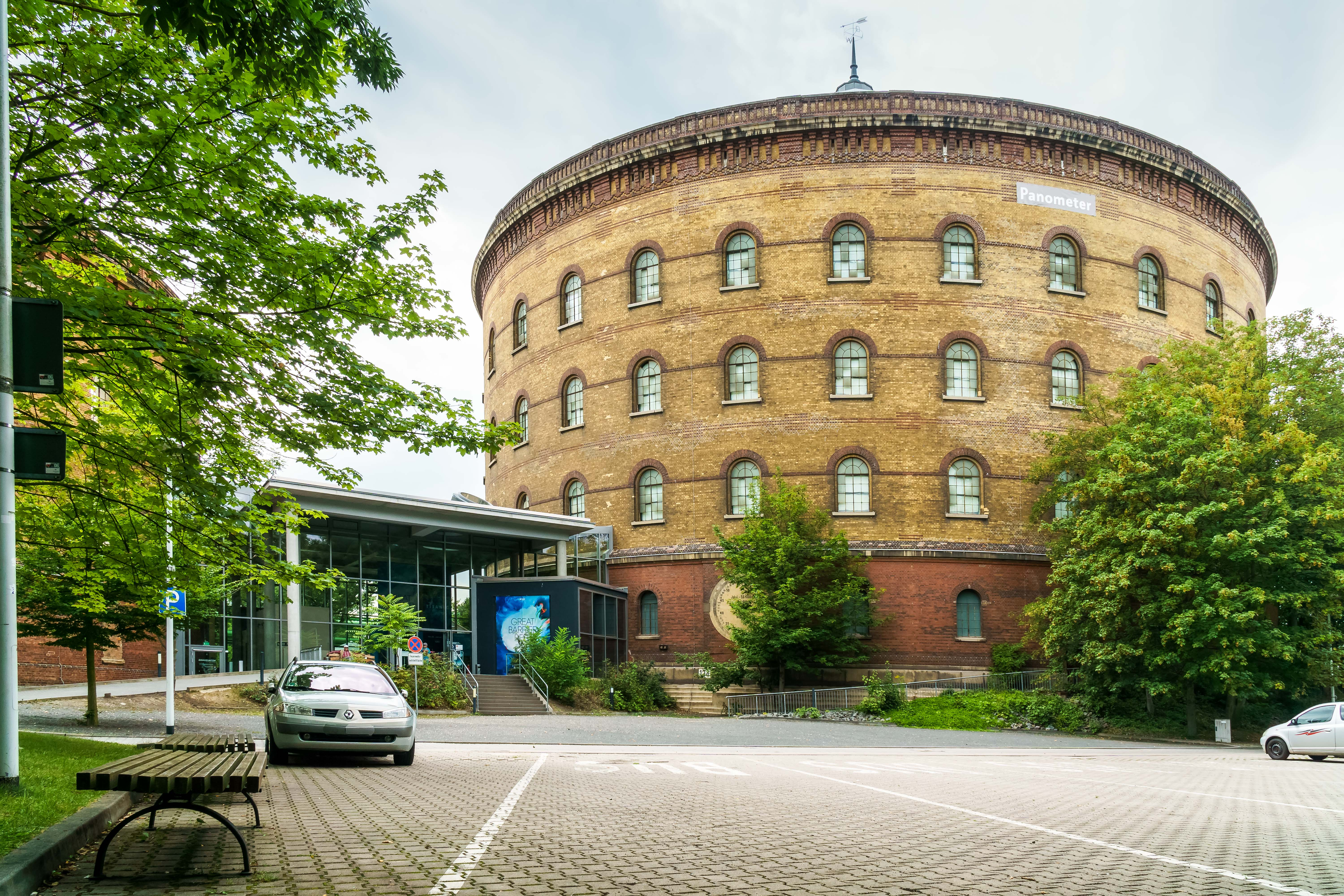 Gasometer II (Panometer) auf dem Gelände der Stadtwerke Leipzig, Richard-Lehmann-Straße 114 in Leipzig-Connewitz